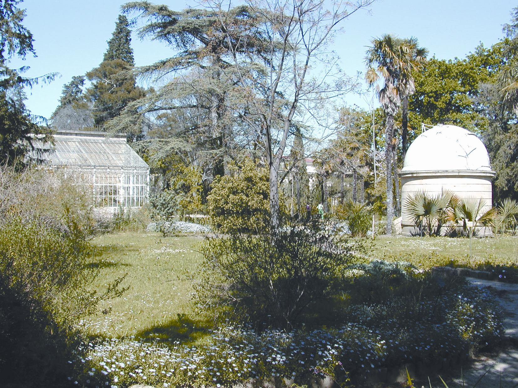 Le Jardin des Plantes de Montpellier Photographie personnelle prise en mai 2005